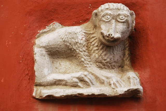 Frammento di bassorilievo con il leone di San Marco, San Marco dei Cavoti (BN), Italia